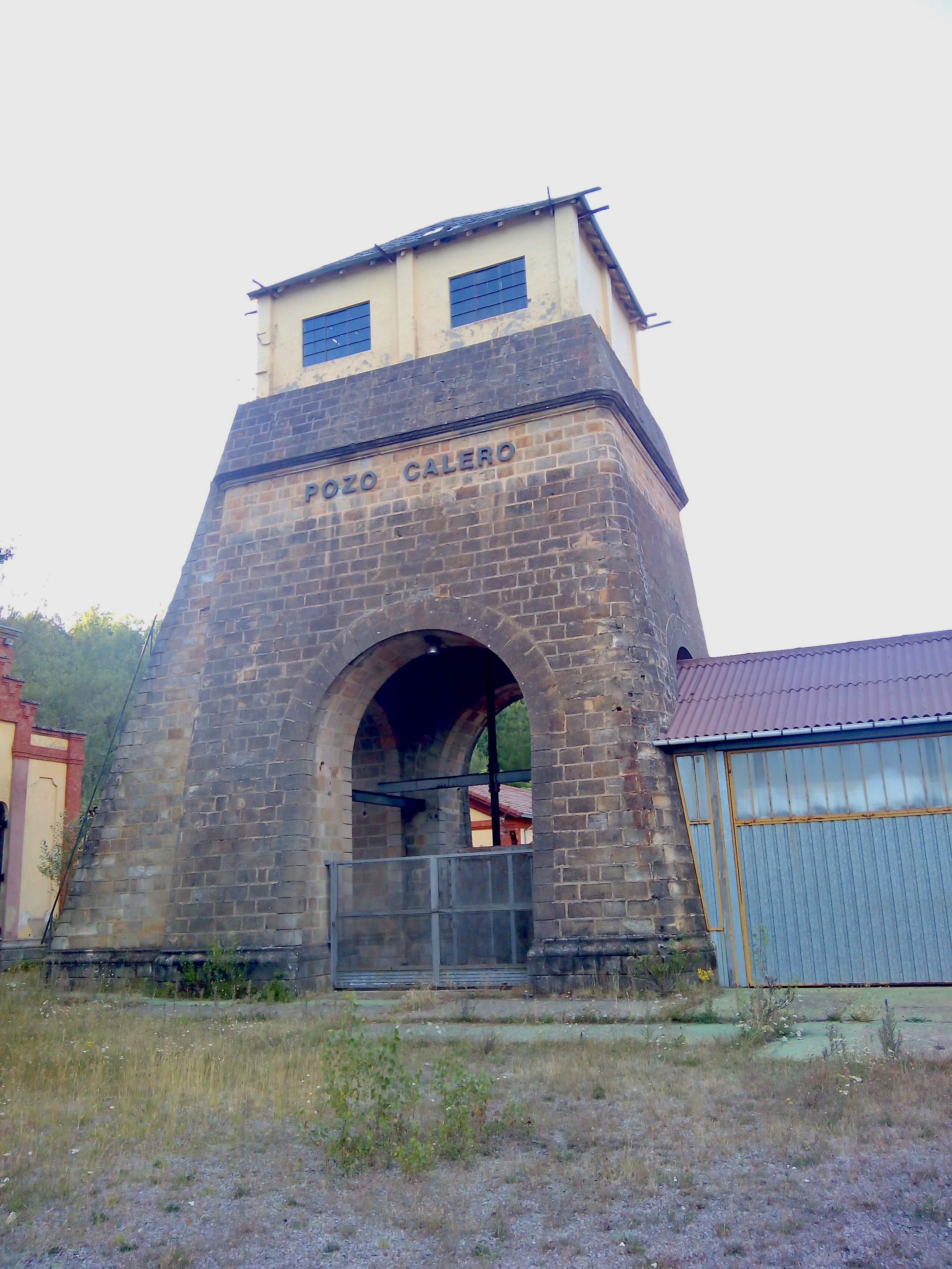 Castillete del Pozo Calero en Barruelo de Santullán, España.